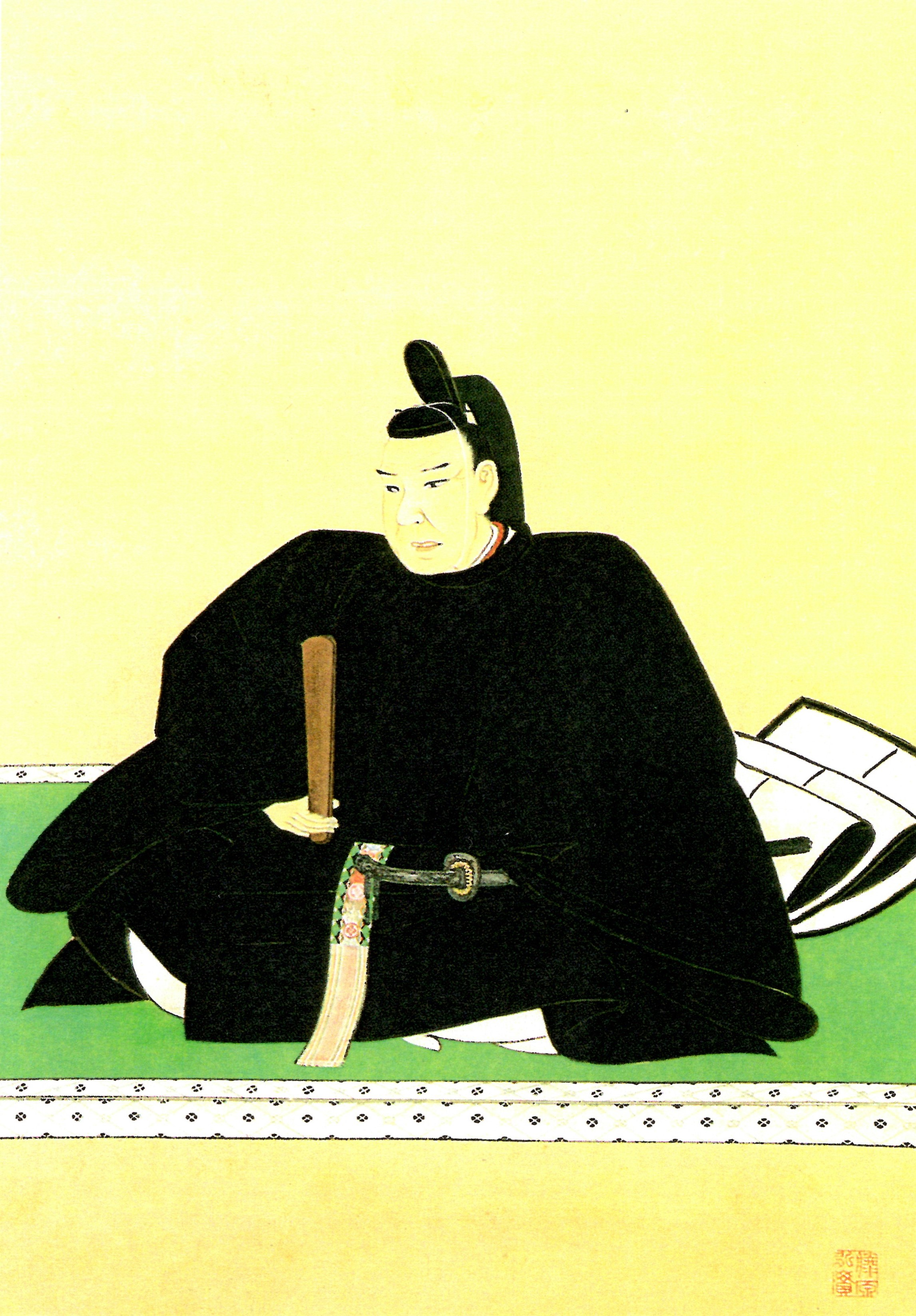 堀田正衡の肖像。